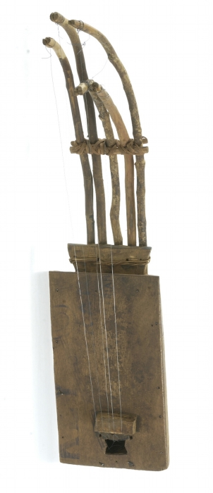 Deze samengestelde boog bevat 5 houten bogen (1 ontbreekt) die bij elkaar worden gehouden door middel van een dwarslat en reepjes plantaardig vezel. De snaren (incompleet) lopen over een kam op de klankkast, waaronder zich een klankgat bevindt.